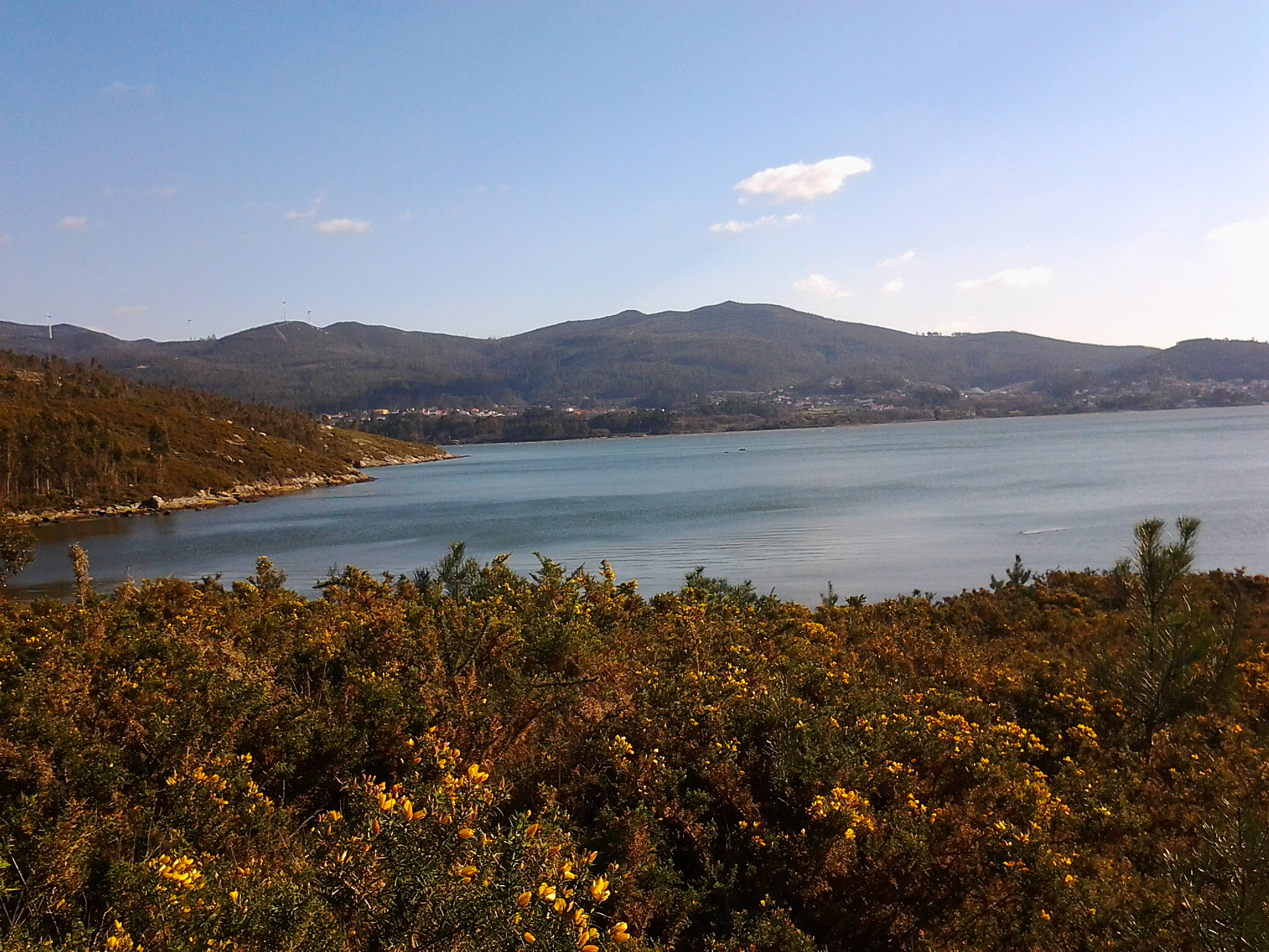 Enseada de Rial.